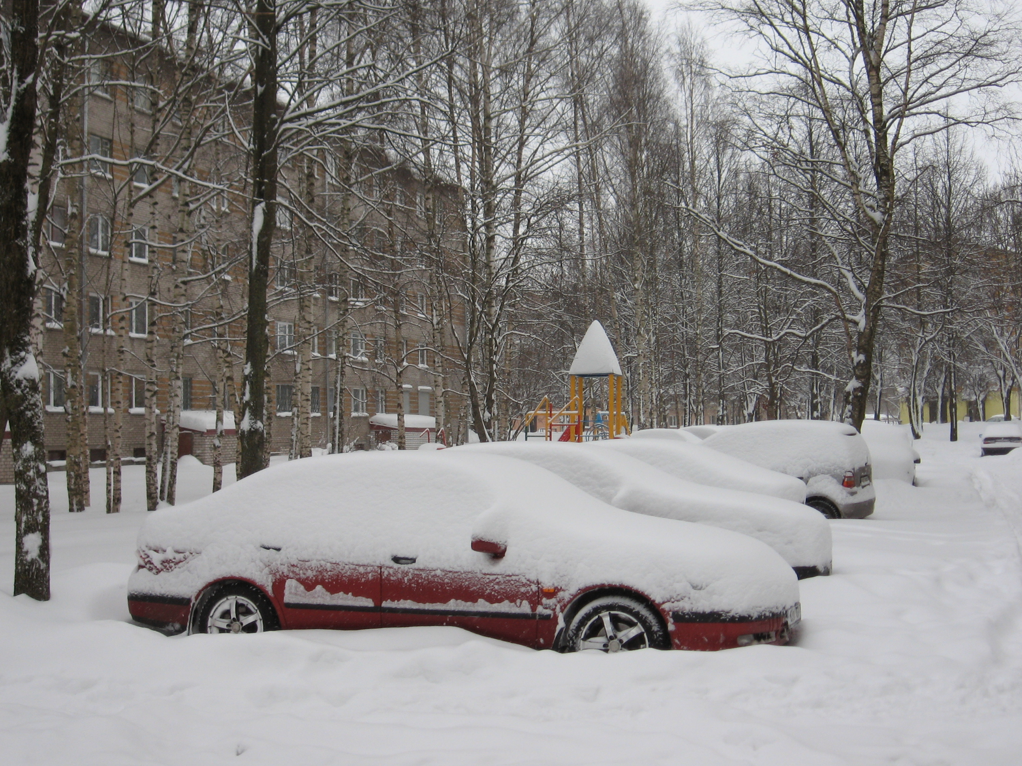 Monika lumetormi tagajärjed Narvas, Eesti